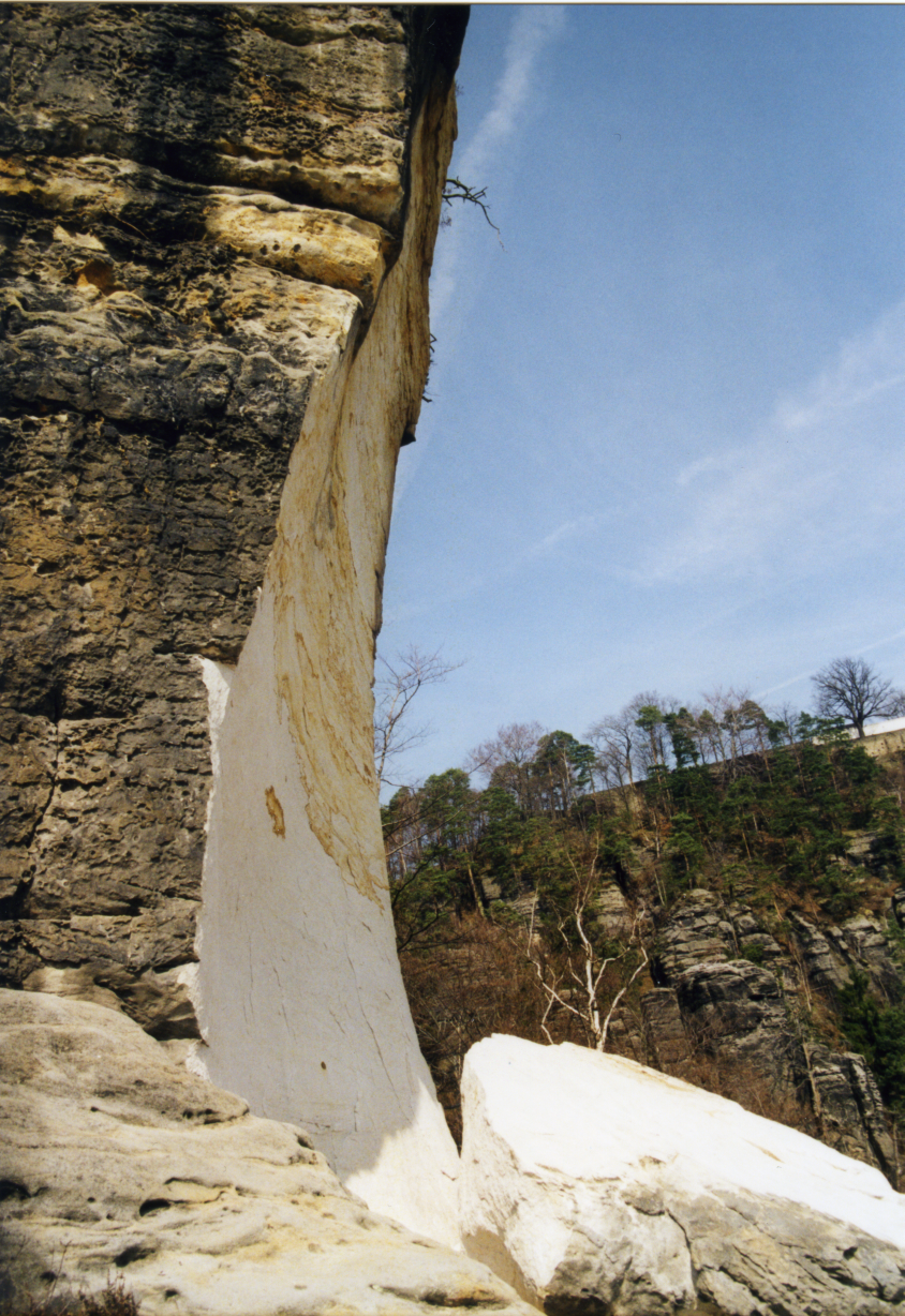 Der Felsen Wartturm im Elbsandsteingebirge